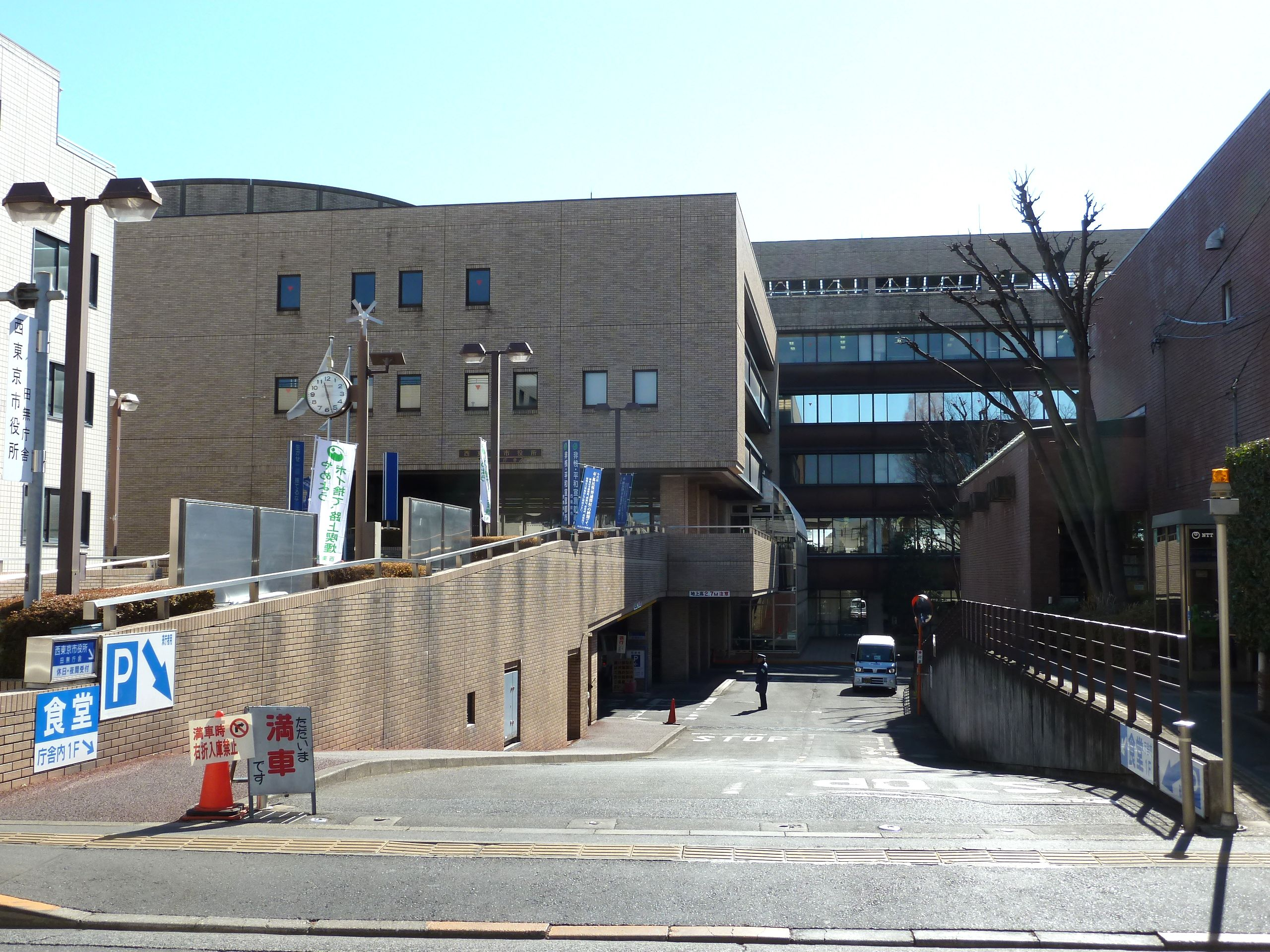 西東京市役所田無庁舎